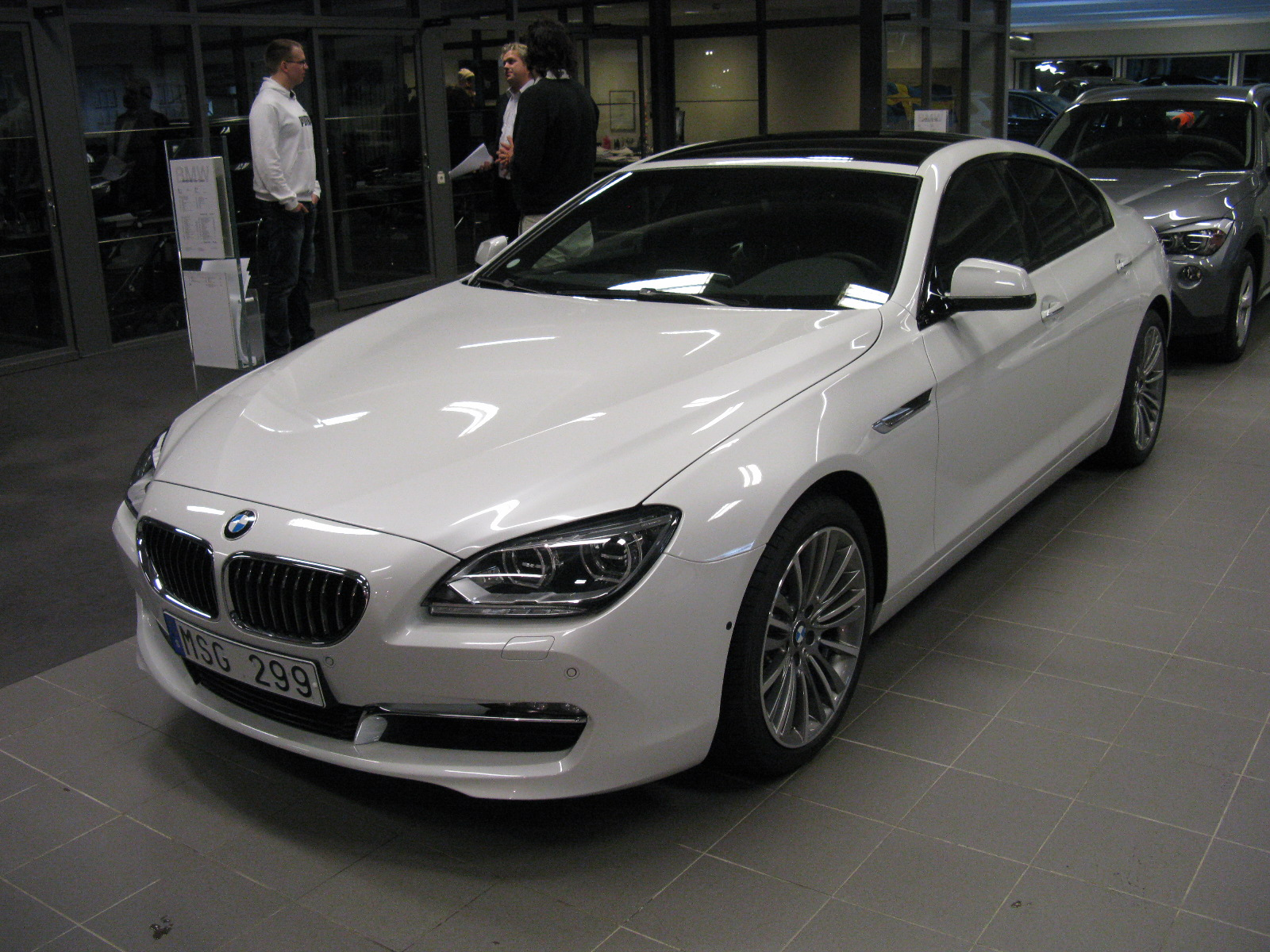 BMW 640i GranCoupé